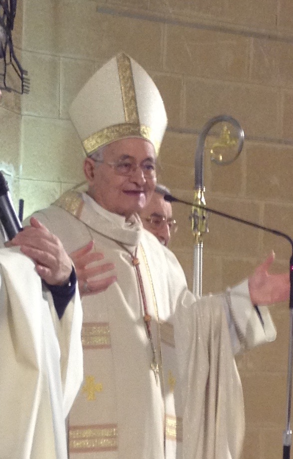 Cardinale De Giorgi in paramenti durante una celebrazione liturgica